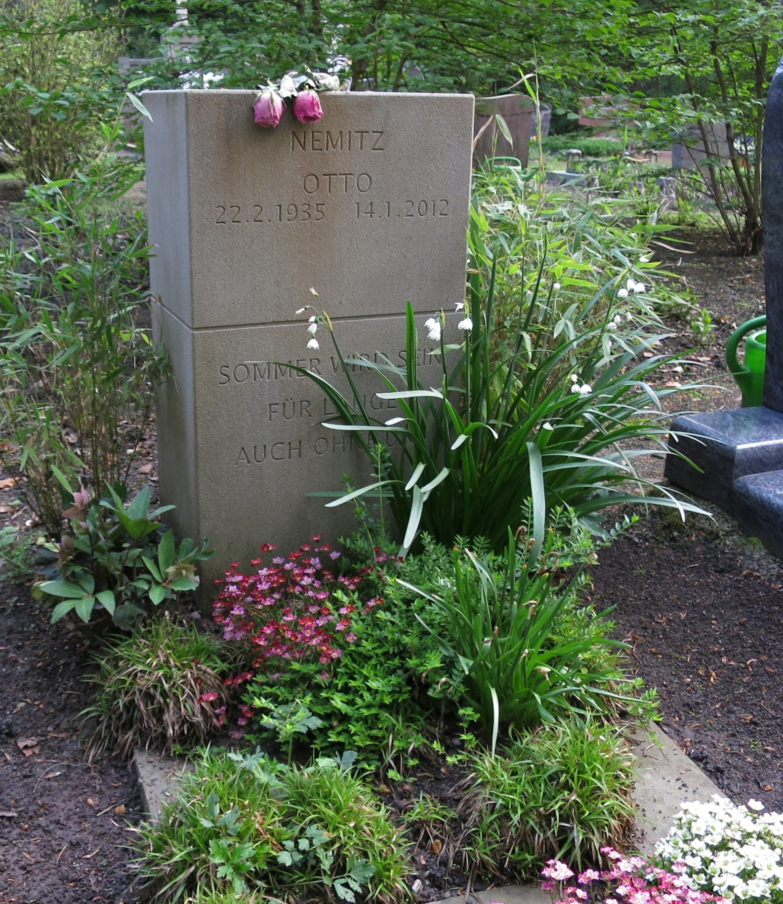 Otto Nemitz - Grab auf Kölner Südfriedhof